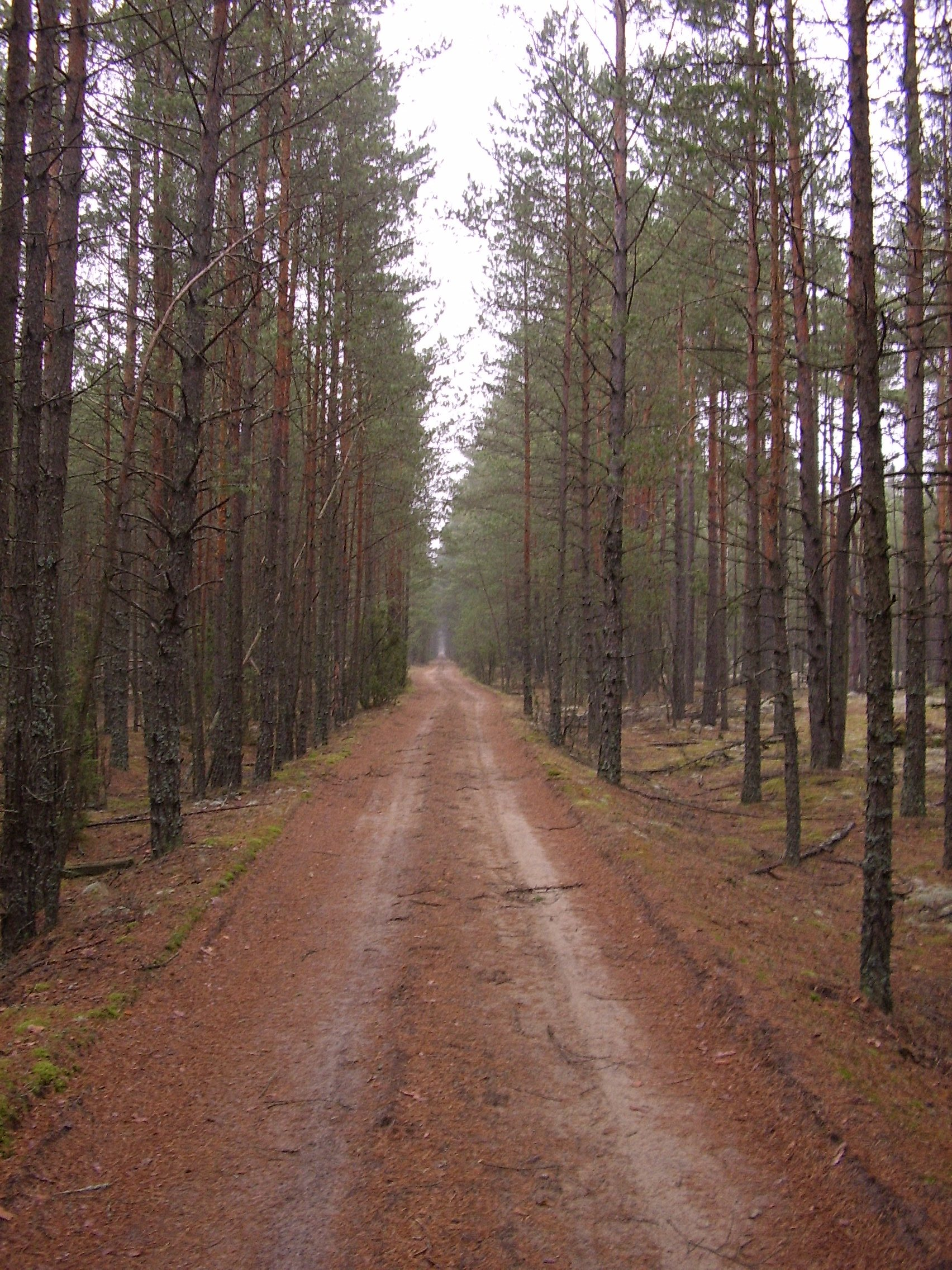 Prancūzkelis, Mykolas, 2007